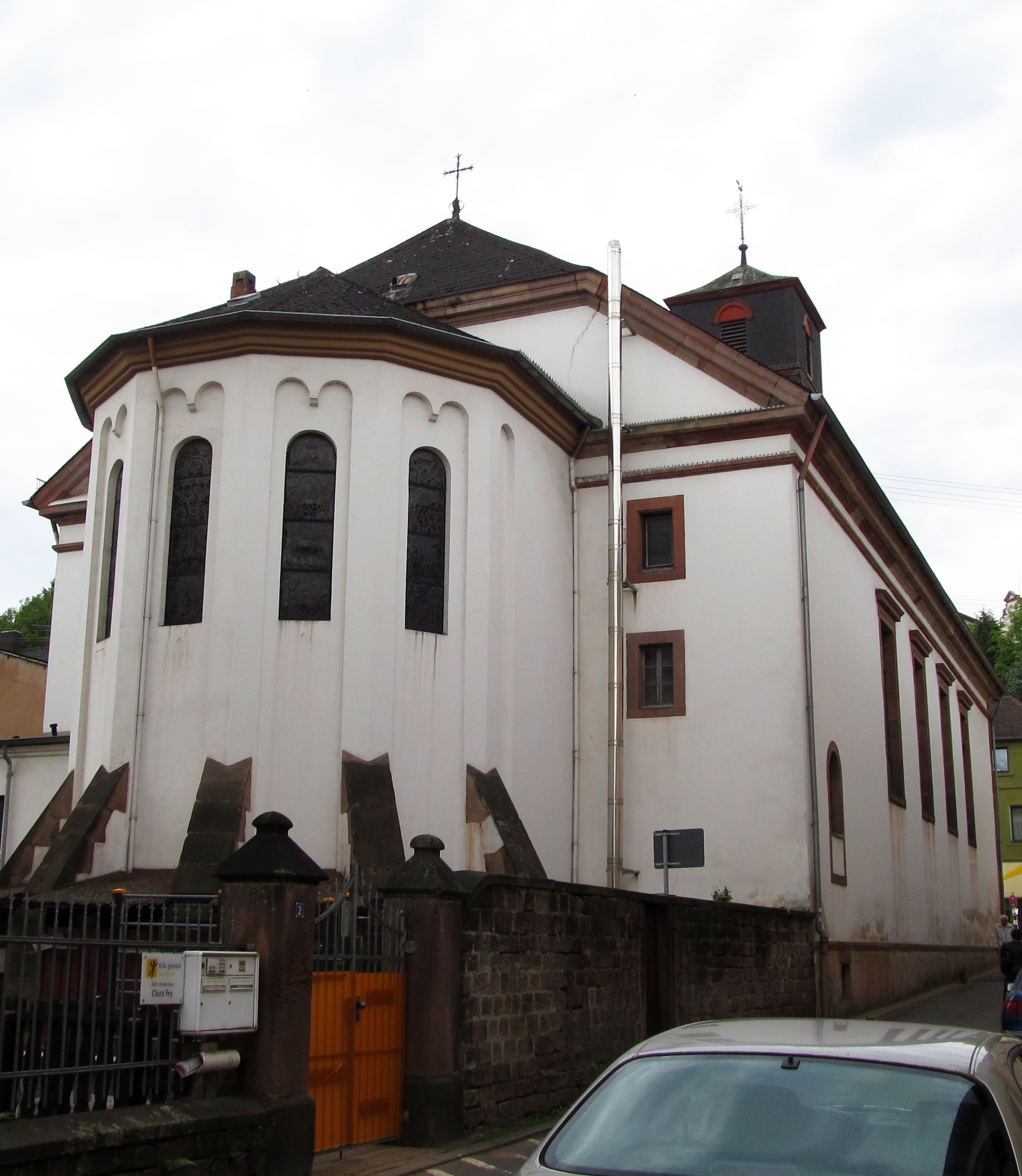 Katholische Kirche in Ottweiler in der Wilhelm-Heinrich-Straße